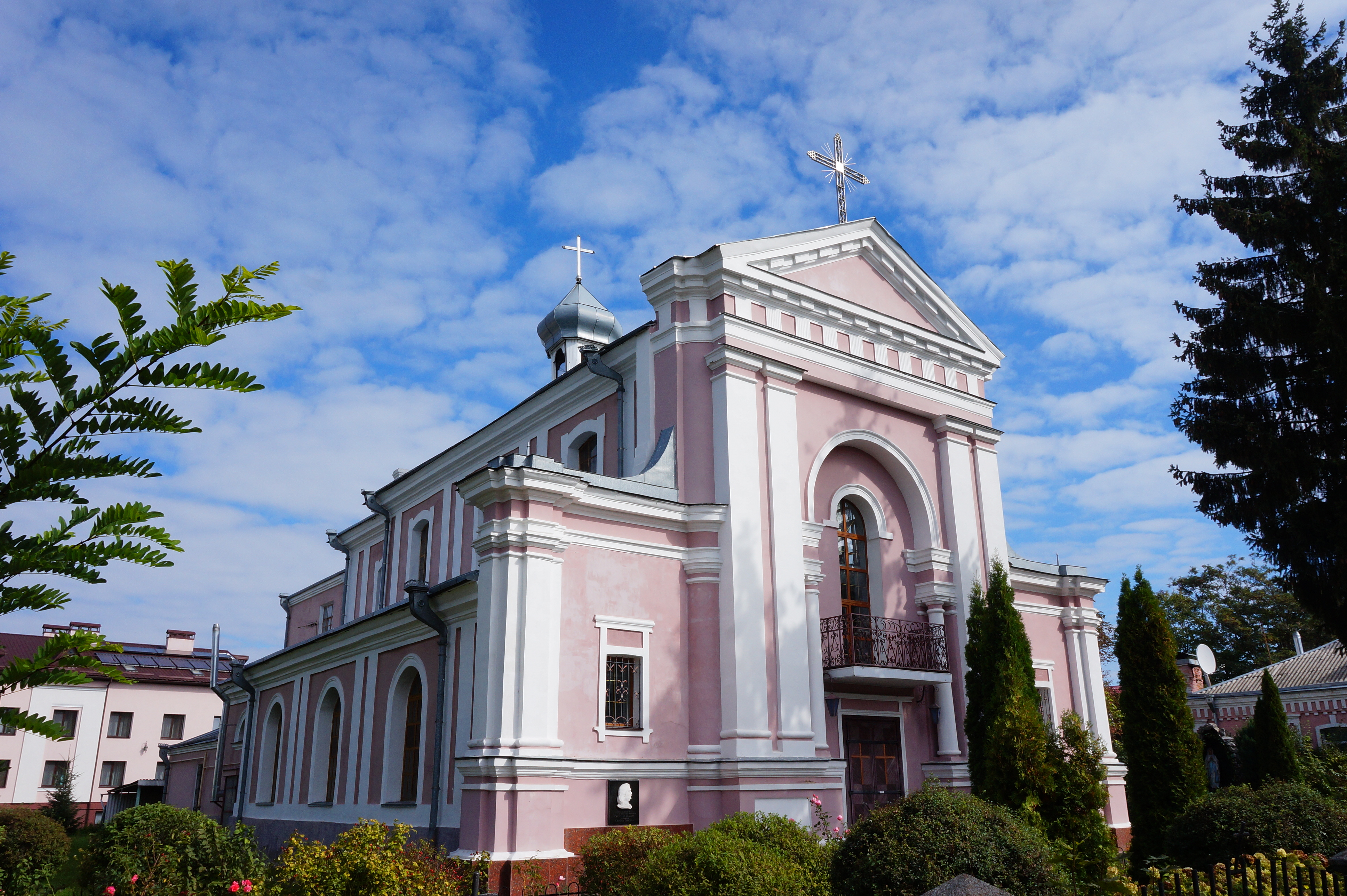 Костел св. Варвари, в якому в 1850 році вінчався Оноре де Бальзак, французський письменник, Бердичів, вул. Європейська, 25 (колишня вул. К. Лібкнехта, 25)